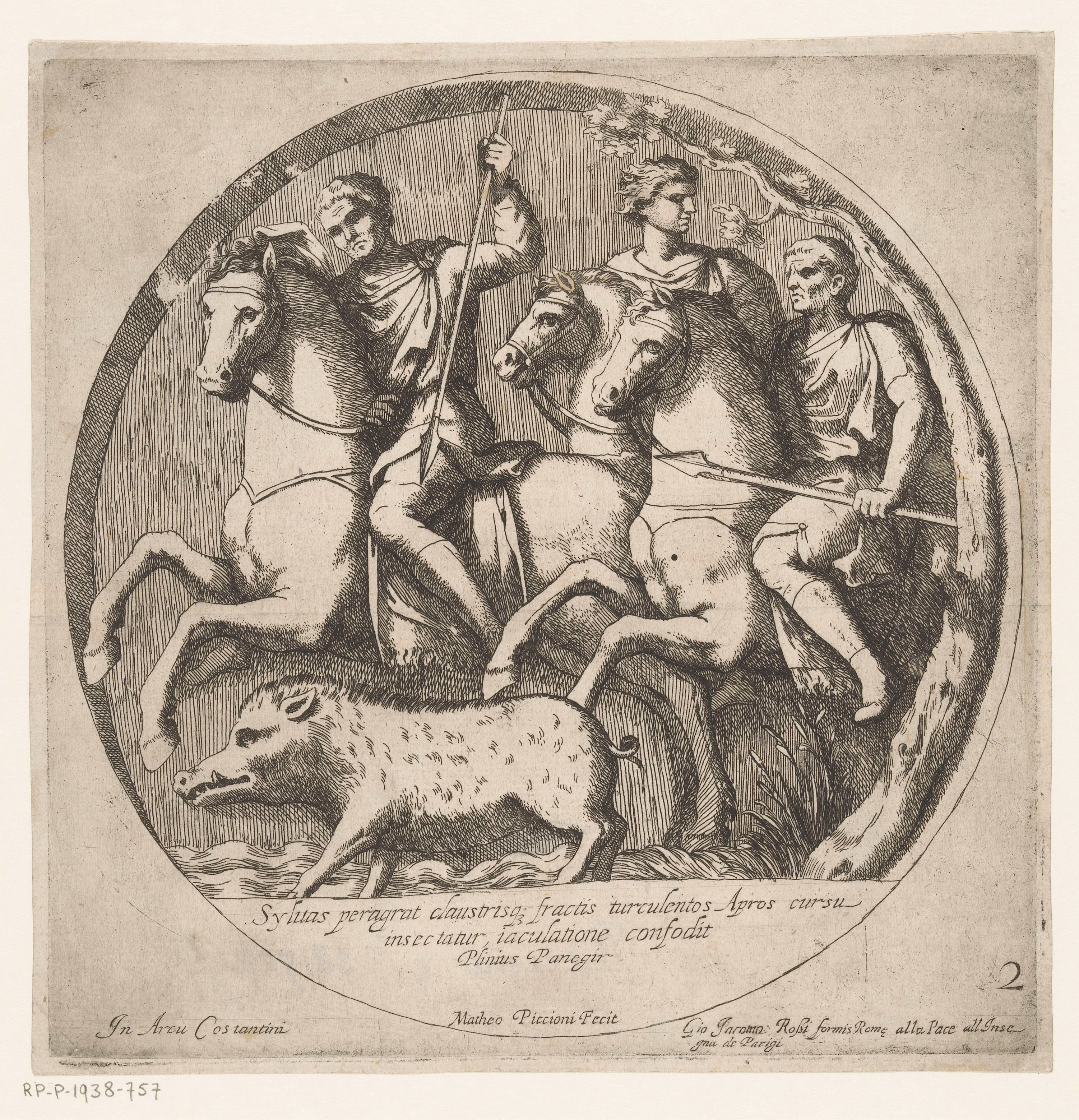 IdentificatieTitel(s): Jacht op een everzwijnBas-reliëfs op de Boog van Constantijn (serietitel)Objecttype: prent Objectnummer: RP-P-1938-757Catalogusreferentie: The Illustrated Bartsch 5Bartsch 5Opschriften / Merken: verzamelaarsmerk, verso, gestempeld: Lugt 2228Omschrijving: Medaillon met bas-reliëf op de Boog van Constantijn te Rome. Drie mannen te paard jagen op een everzwijn. Onderin het medaillon een drieregelige tekst in het Latijn. Genummerd rechtsonder: 2.VervaardigingVervaardiger: prentmaker: Matteo Piccioni (vermeld op object)uitgever: Giovanni Giacomo de'Rossi (vermeld op object)naar beeld van: anoniem (vermeld op object)Plaats vervaardiging: prentmaker: Italiëuitgever: Romenaar beeld van: RomeDatering: 1637 - 1691Fysieke kenmerken: etsMateriaal: papier Techniek: etsenAfmetingen: plaatrand: h 222 mm × b 220 mmToelichtingDeze prent is onderdeel van een serie van 21 prenten met bas-reliëfs op de Boog van Constantijn te Rome.OnderwerpWat: piece of sculpture, reproduction of a piece of sculptureboar-huntingVerwerving en rechtenCredit line: Schenking van de heer D.H. Cevat, GuernseyVerwerving: schenking 1938Copyright: Publiek domein